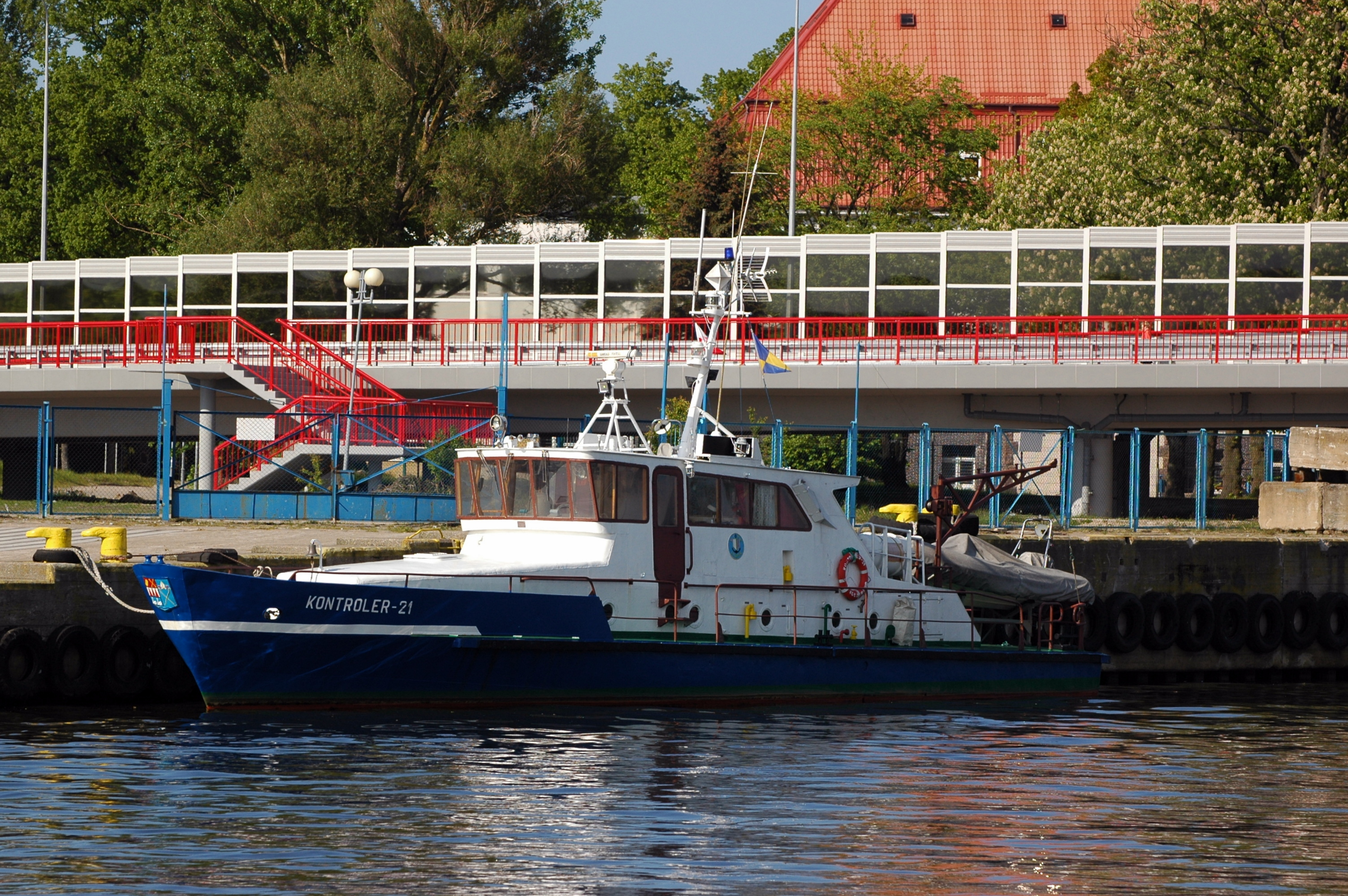 Kontroler-21 w kołobrzeskim porcie